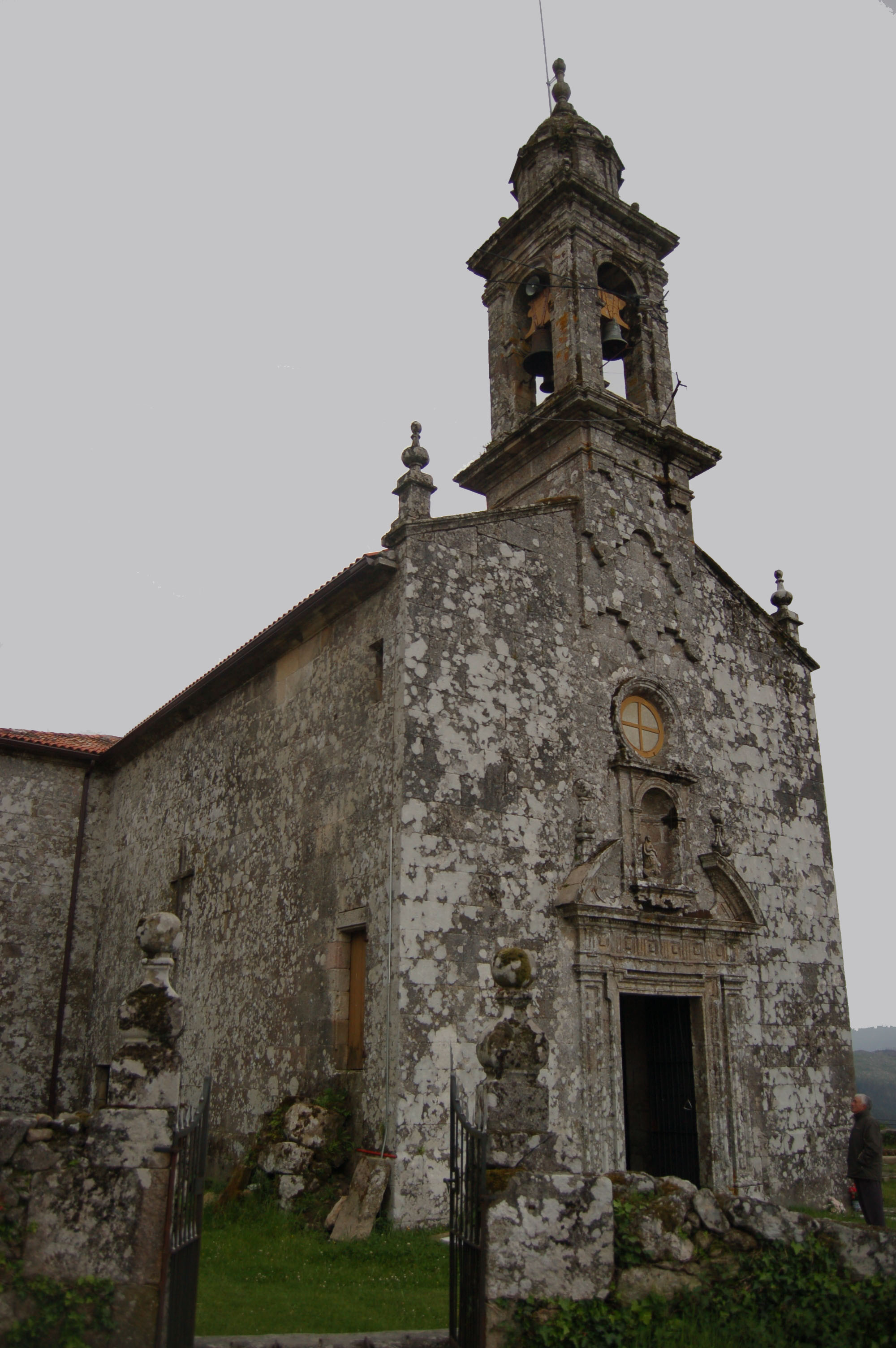 Igrexa parroquial de Santa María de Moimenta (Campo Lameiro)